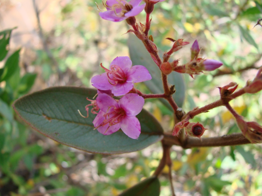 Macairea radula - MELASTOMATACEAE Chapada Imperial - Brasília - Distrito Federal - Brasil.